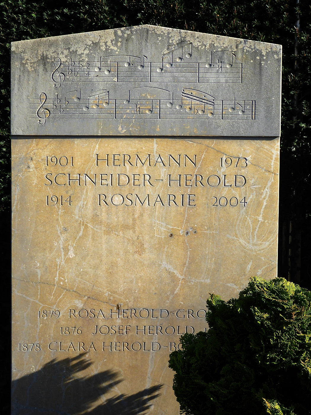 Hermann Schneider-Herold (1901–1973), Schriftsteller, Redakteur, Preis der Schweiz. Rundspruch-gesellschaft für seine Hörspiele, Johann-Peter-Hebel-Preis Familiengrab auf dem Friedhof Hörnli, Riehen, Basel-Stadt